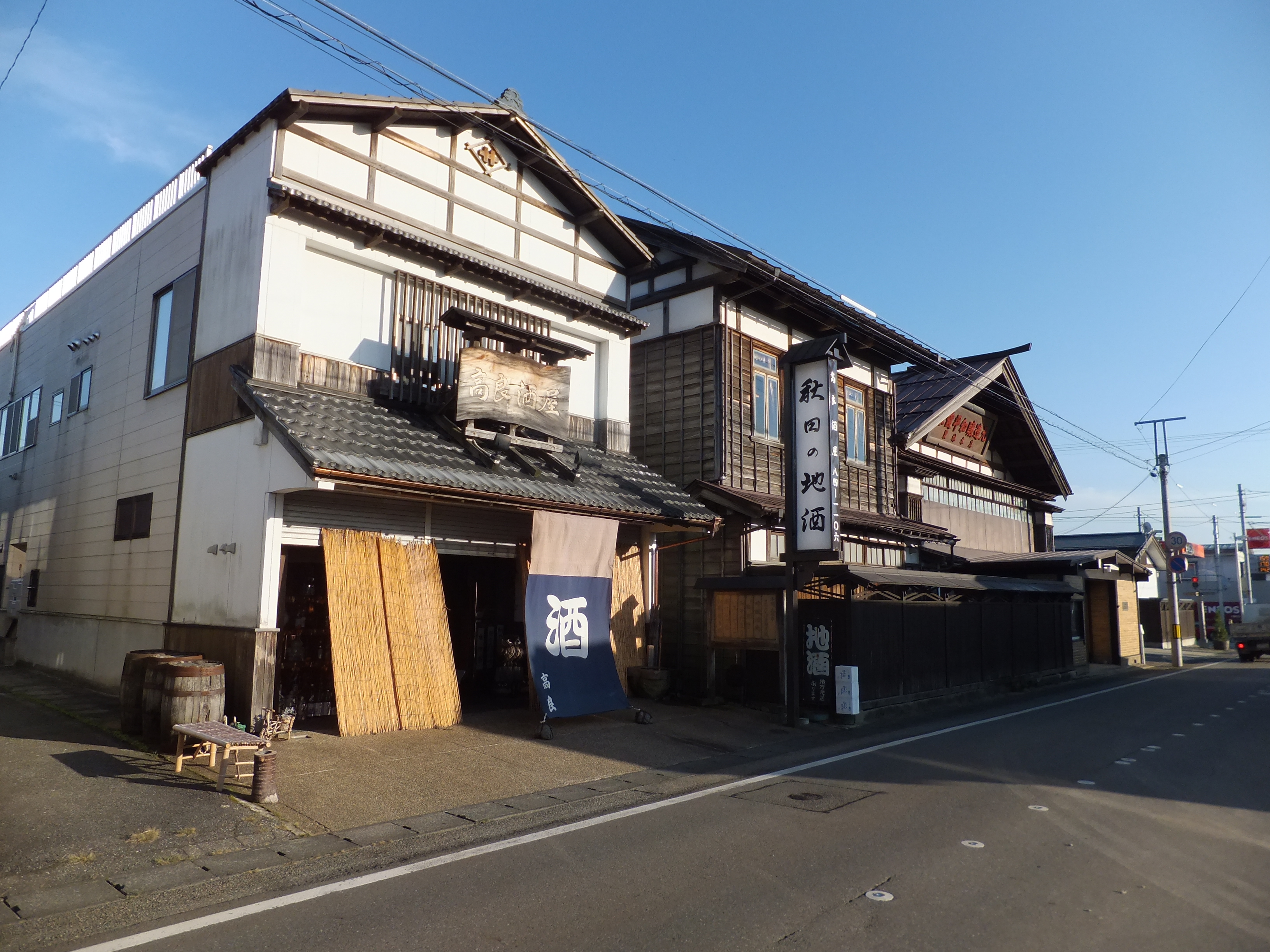 高良酒屋と栗林酒造店。秋田県美郷町六郷にて